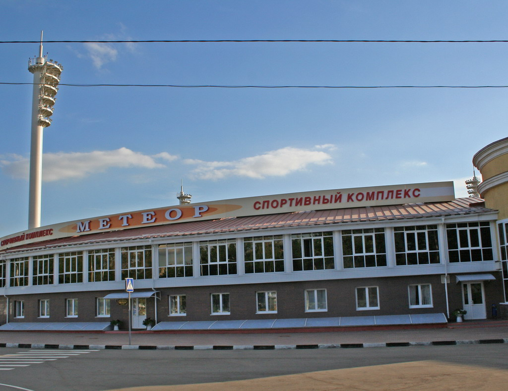 Zhukovsky Stadion Meteor